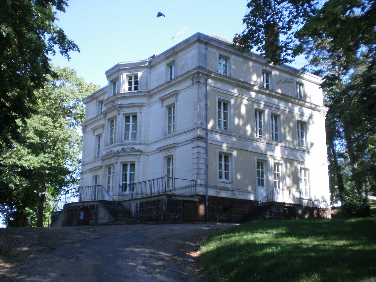 La Glaudonnerie